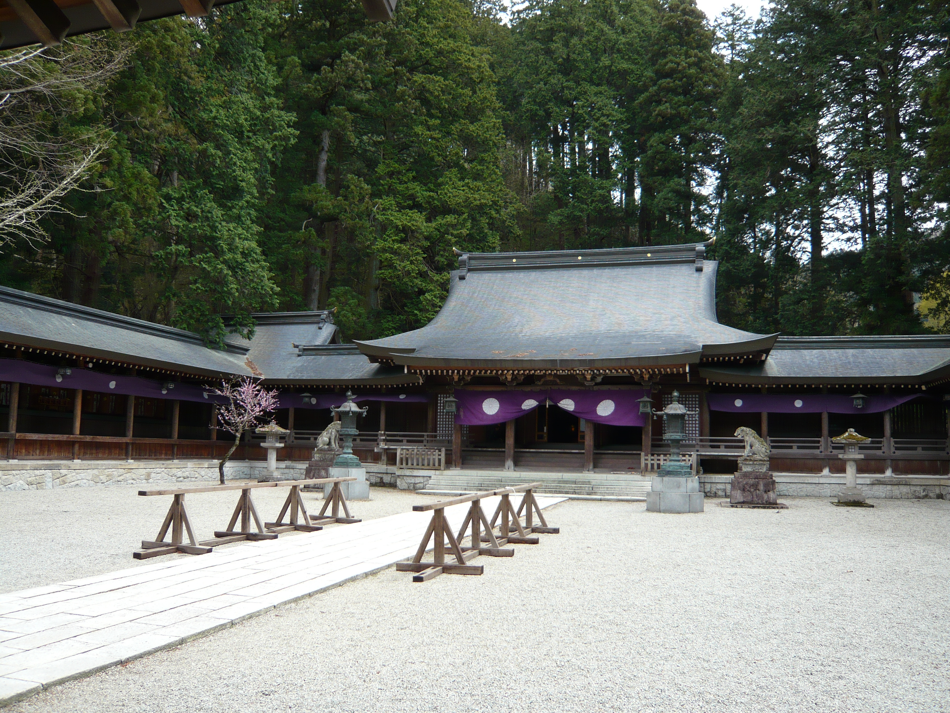 the haiden of Hida-ichinomiya Minashi-jinja, Takayama, Gifu, Japan 飛騨一宮水無神社（岐阜県高山市）拝殿